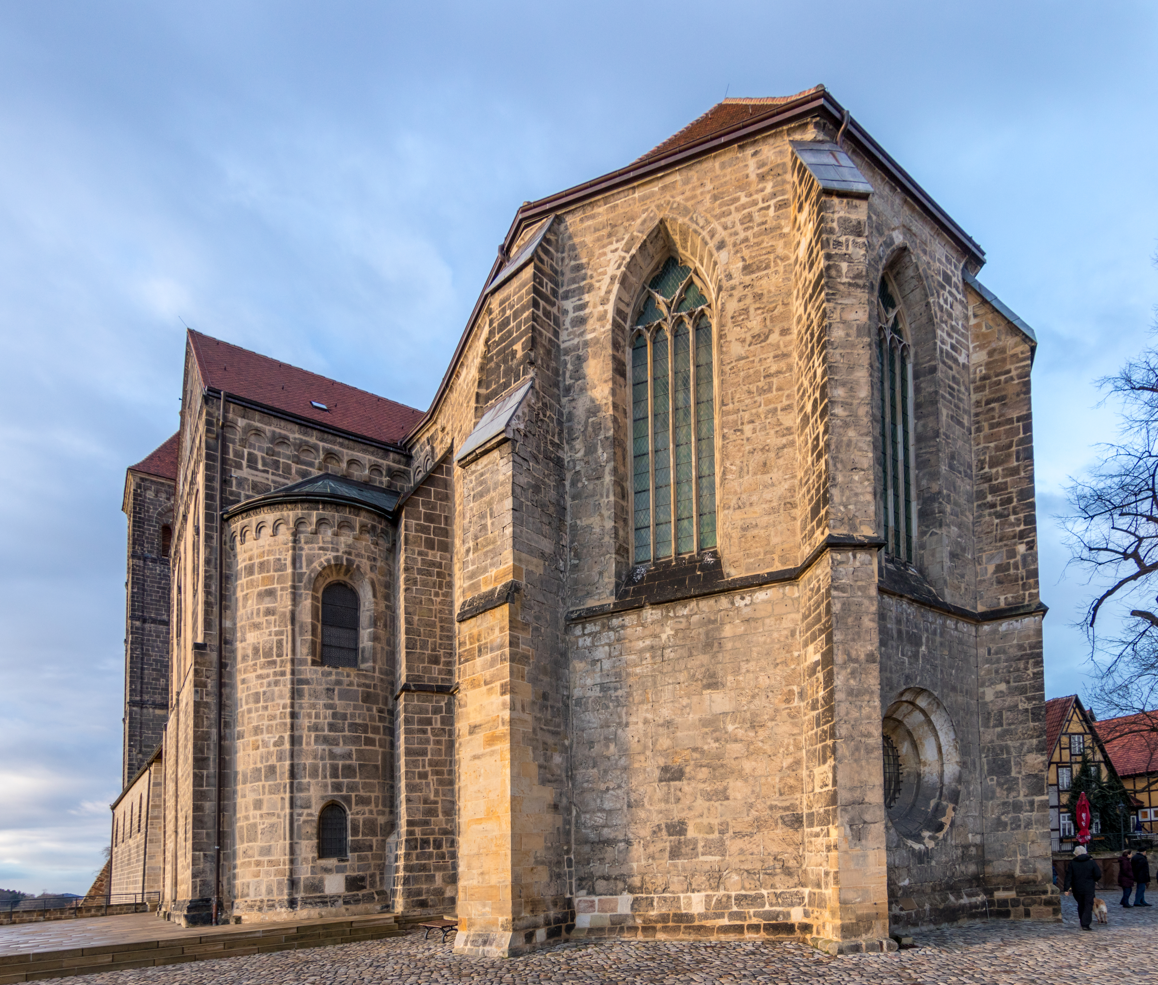 Die Stiftskirche St. Servatius (Quedlinburg)